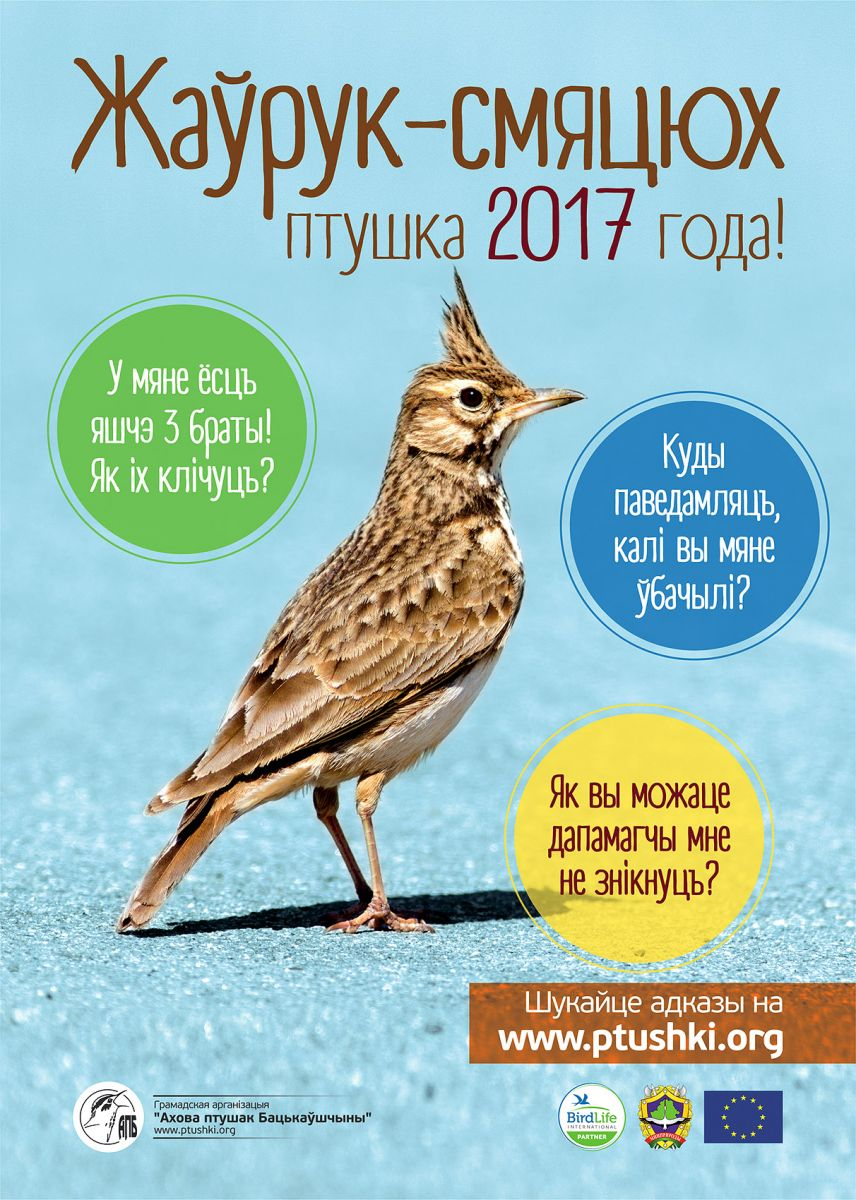 Плакат з птушкай 2017 года па версіі АПБ.